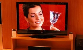 Televisor LCD, aporta gran calidad de imagen.